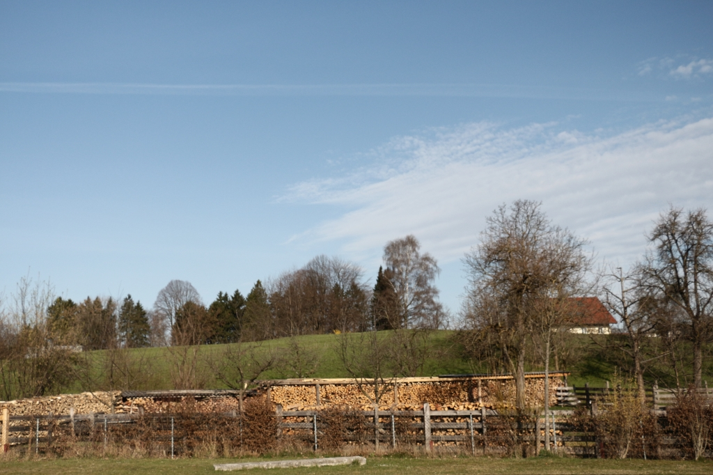 Der Franzosenhügel im Salzburger Stadtteil Liefering aus östlicher Richtung vom der Überdachung des Lieferinger Tunnels (Untertunnelung der Westautobahn) gesehen.